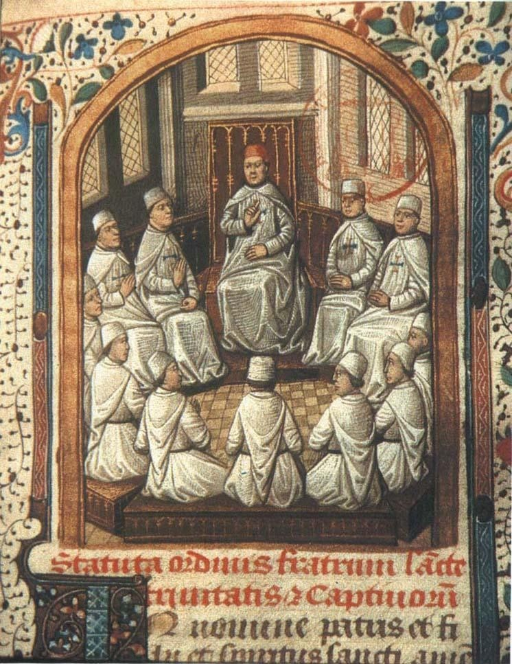 Um capítulo da Ordem trinitária. Miniatura da Regula Fratrum Sanctae Trinitatis et Redemptionis Captivorum, de 1429. (Paris, Bibl. Mazarine, manuscrito 1765). Notem -se as cores características do hábito e da cruz da O rdem, assim explicadas: o branco significa o Pai; o vermelho (vertical), o Espírito, que fecunda a Virgem e desce sobre os Apóstolos; o azul ou cerúleo (horizontal), o Filho deitado no presépio e deposto no sepulcro.